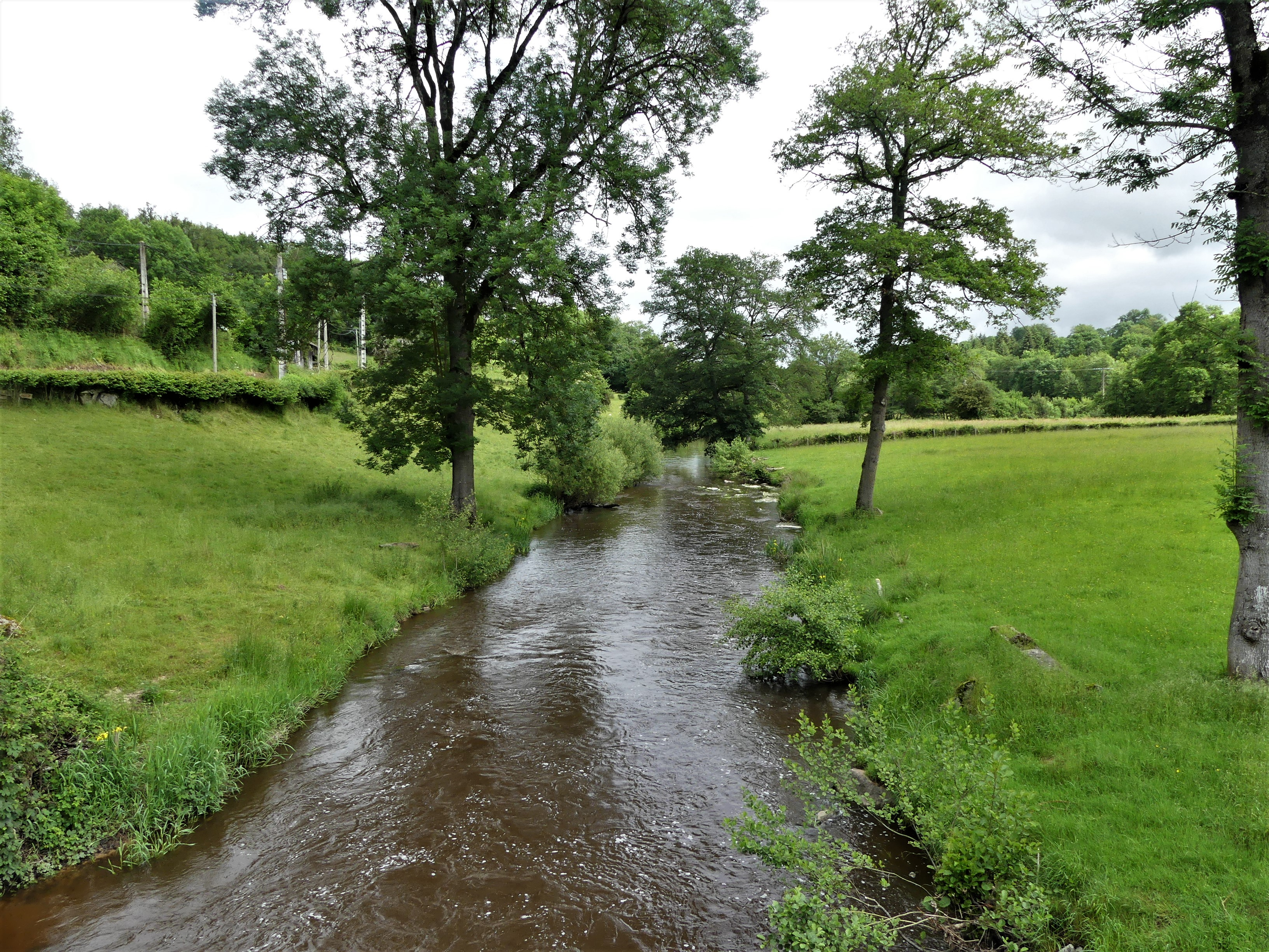 La Tardes au pont de la Gravelle, Saint-Domet, Creuse, France. Vue prise en direction de l'aval.